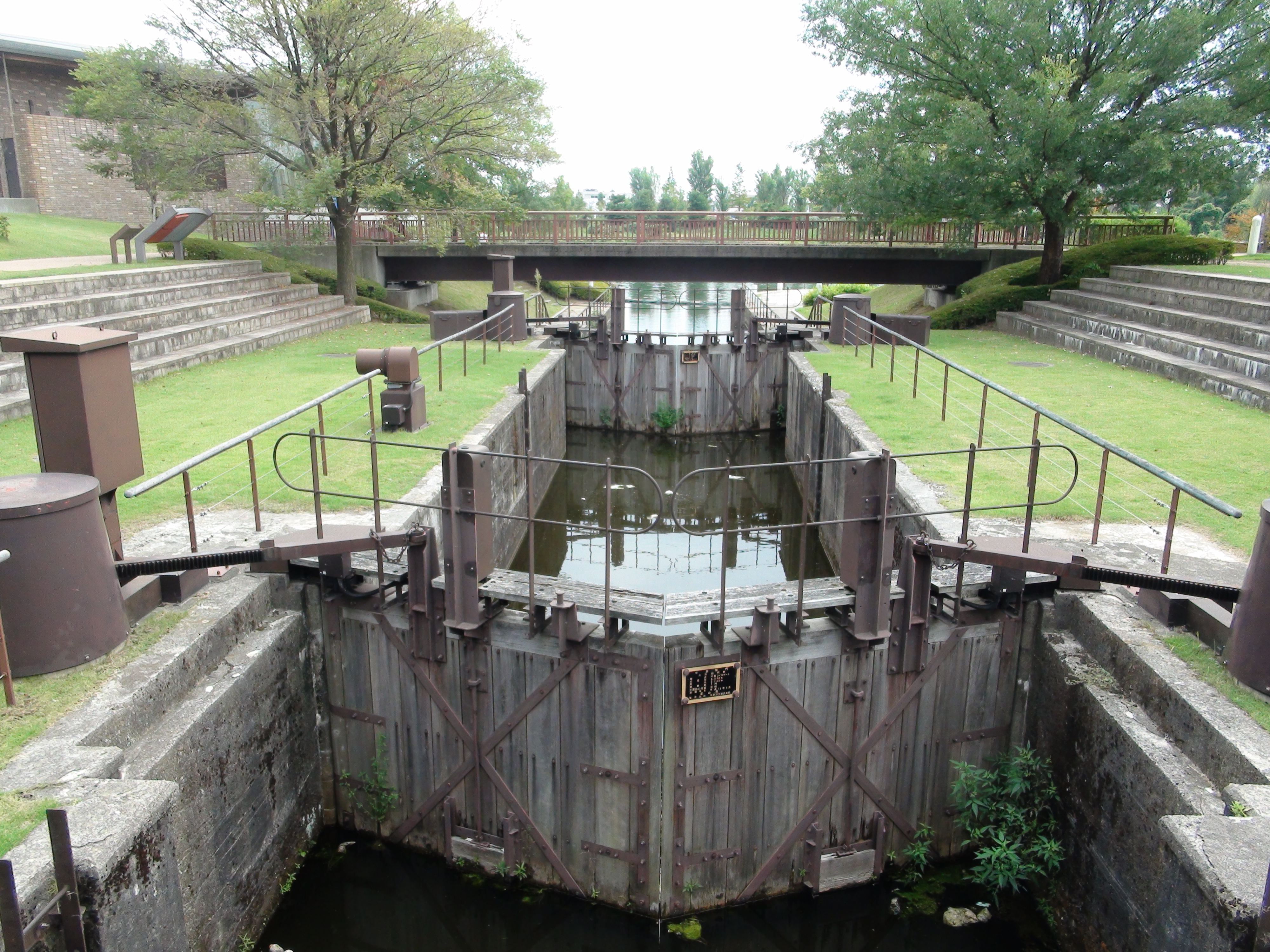 牛島閘門川下側（富山県富山市）